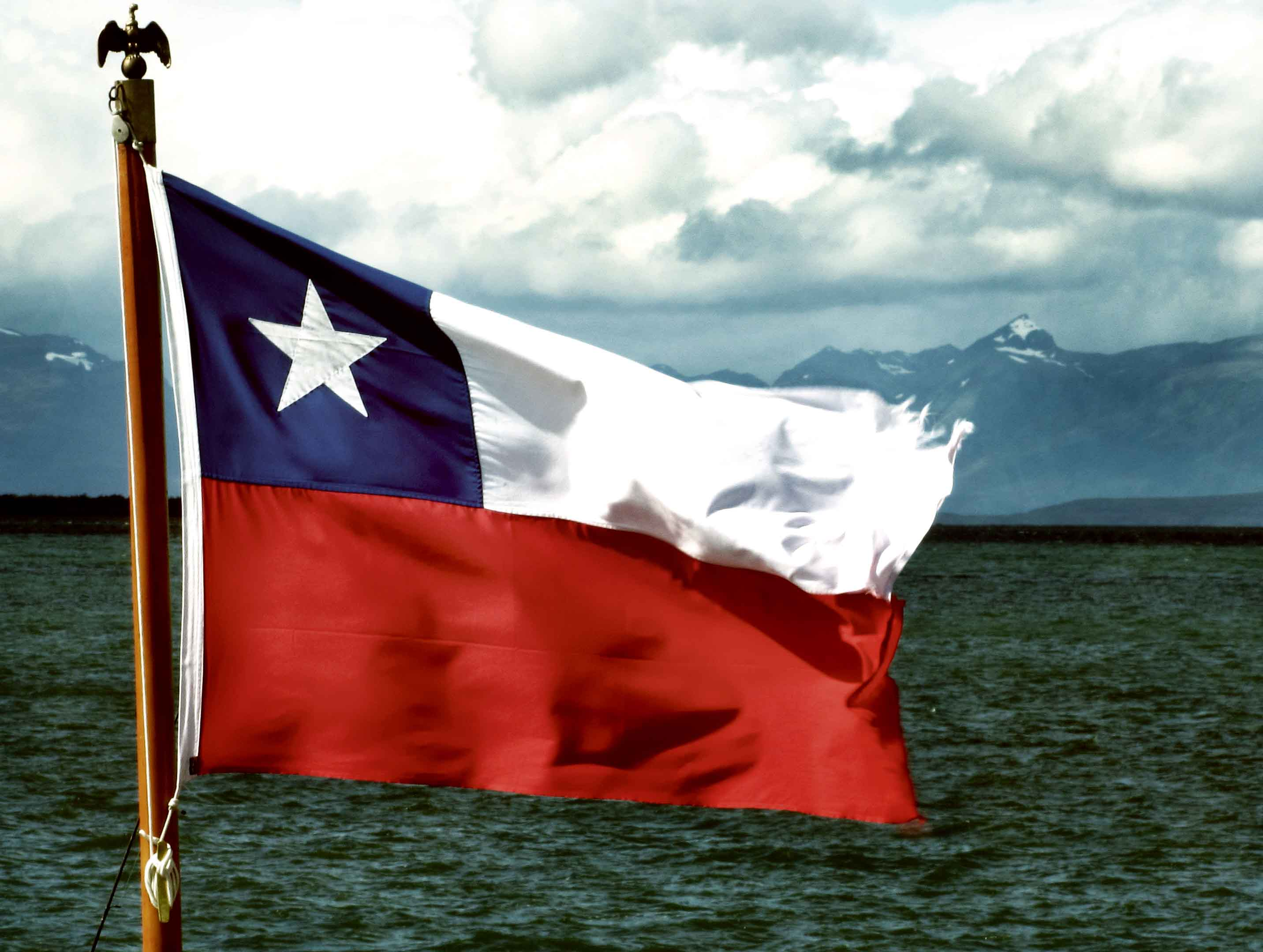 Bandera de Chile en los canales australes.